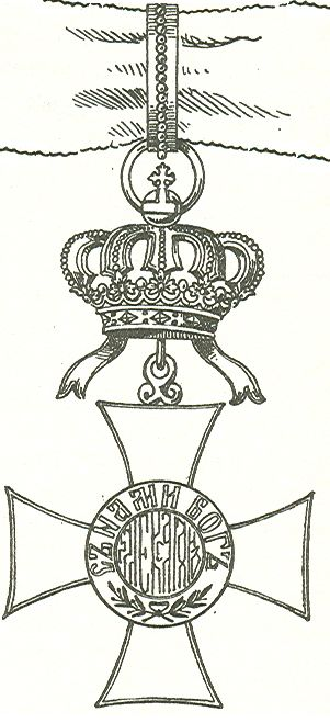 Keten, juweel en ster van de Orde van Sint Patrick